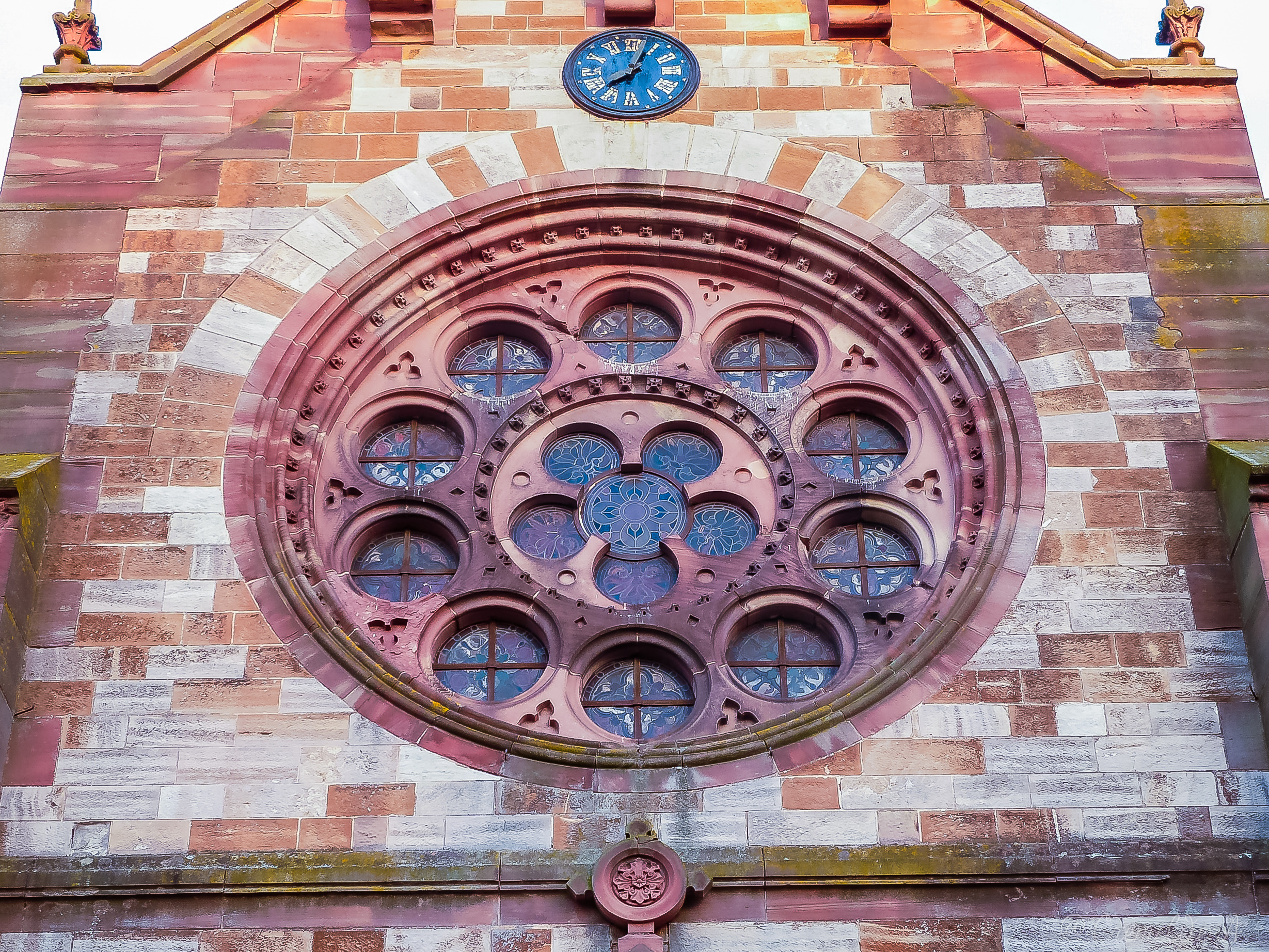 Église Saint-Maur, rue de Viller à Lunéville